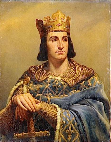 Philippe II dit Philippe-Auguste, Roi de France (1165-1223) selon Louis-Félix Amiel (1802-1864). Peinture conservée à Versailles, musée national du château et des Trianons.